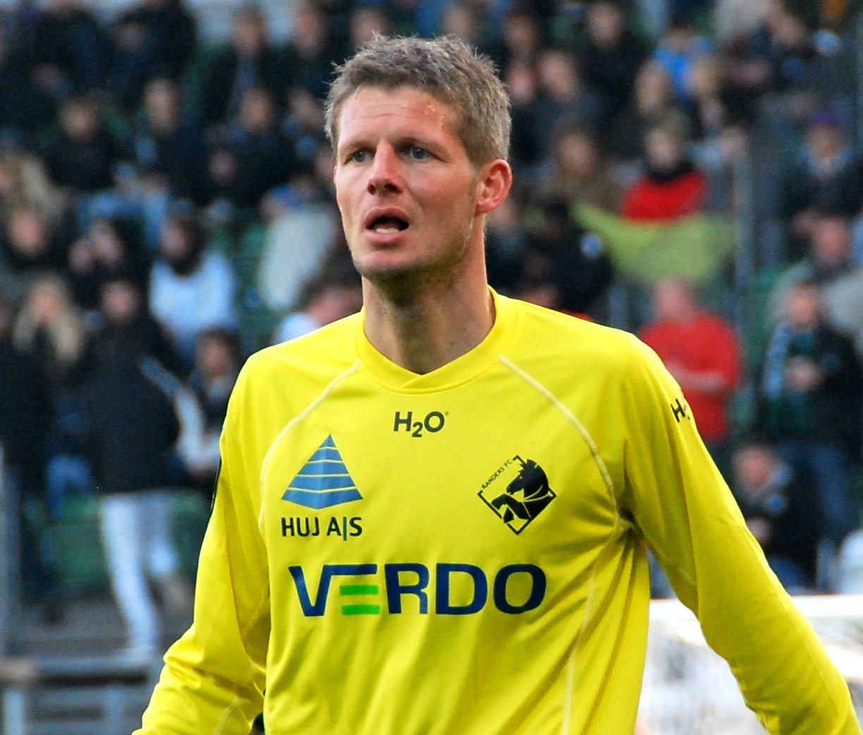 Fodboldspilleren Chris Sørensen fra Randers FC. Her under en 1. divisionskamp mod Viborg FF på Viborg Stadion.